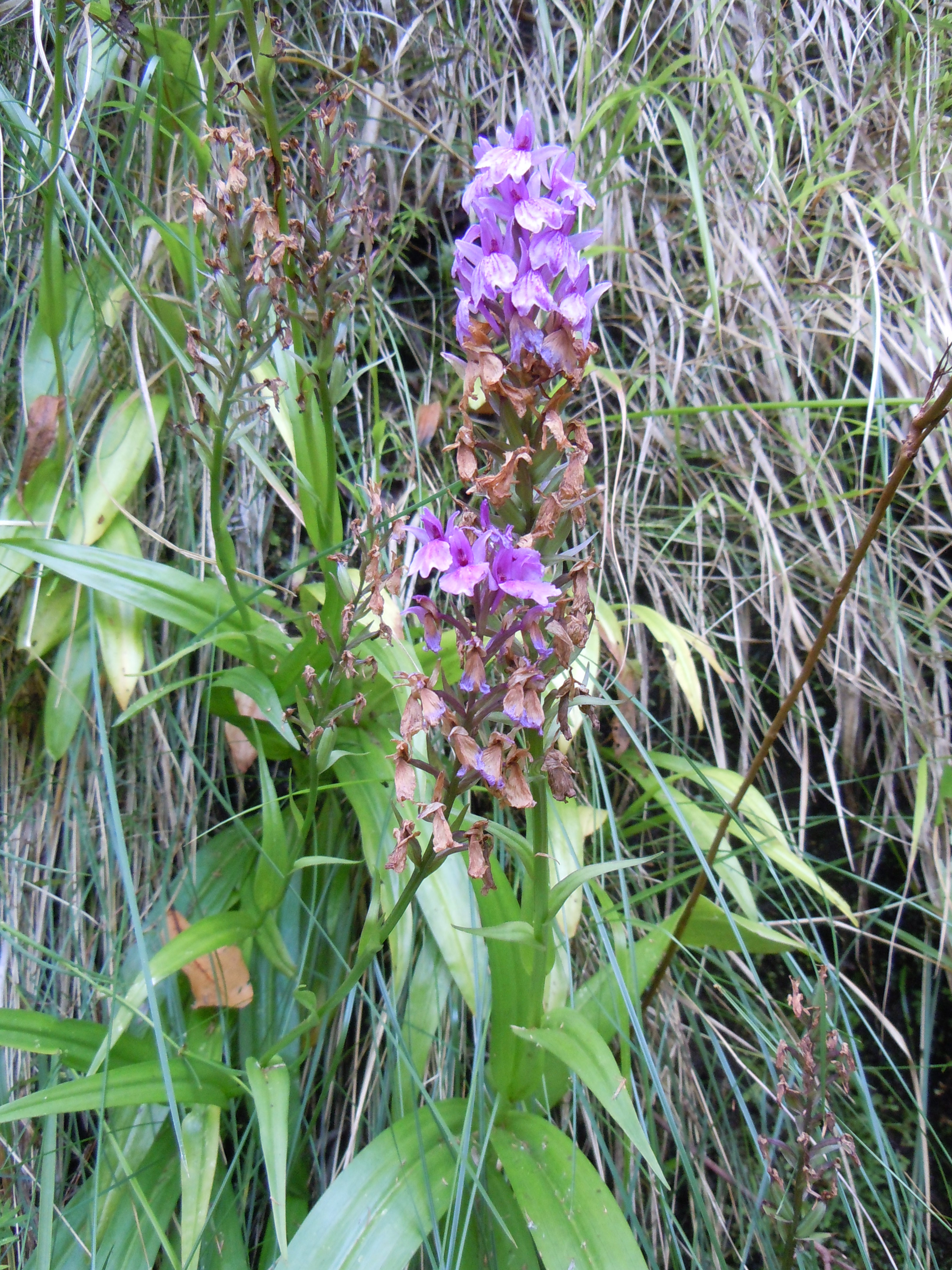 Dactylorhiza foliosa - Levada do Caldeirão Verde - Madere